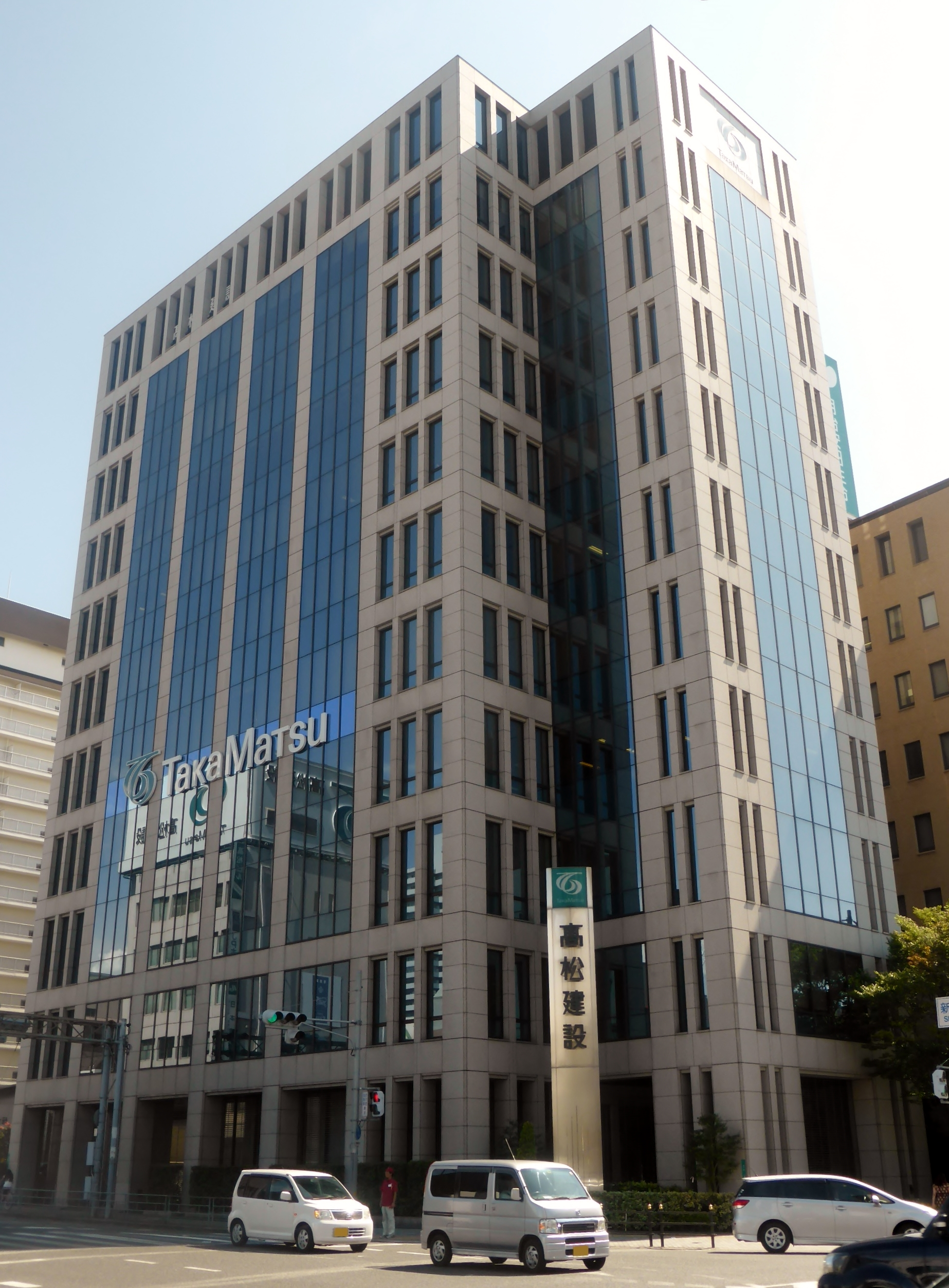 株式会社高松コンストラクショングループ本社を撮影。